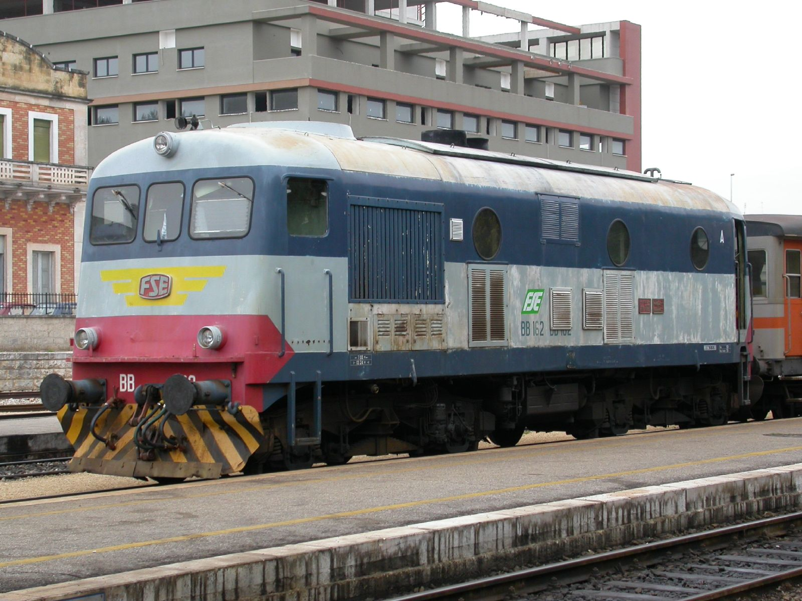 Locomotiva BB 162 (serie BB 150) delle Ferrovie del Sud-Est in sosta a Martina Franca